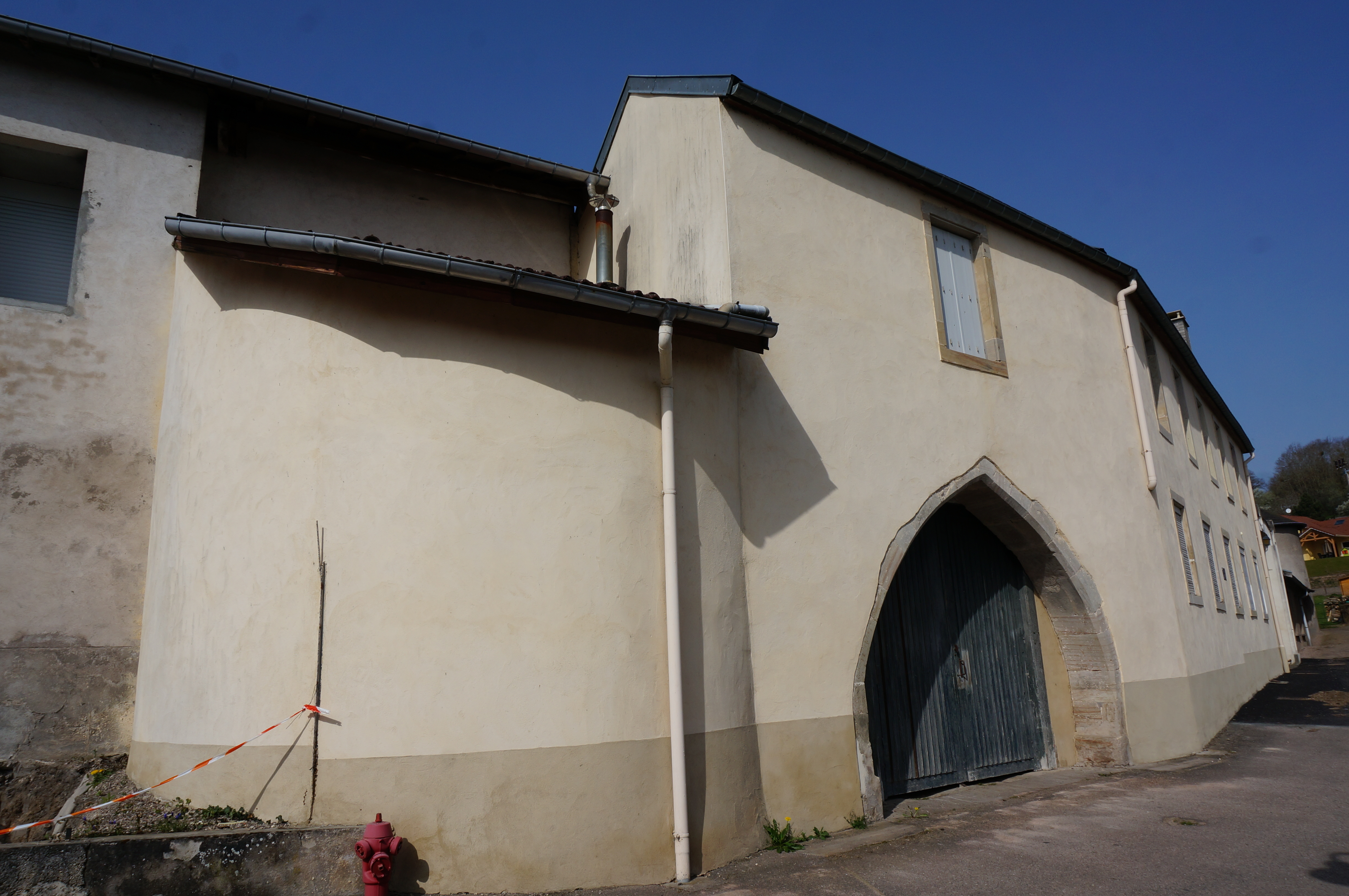 Cf titre.